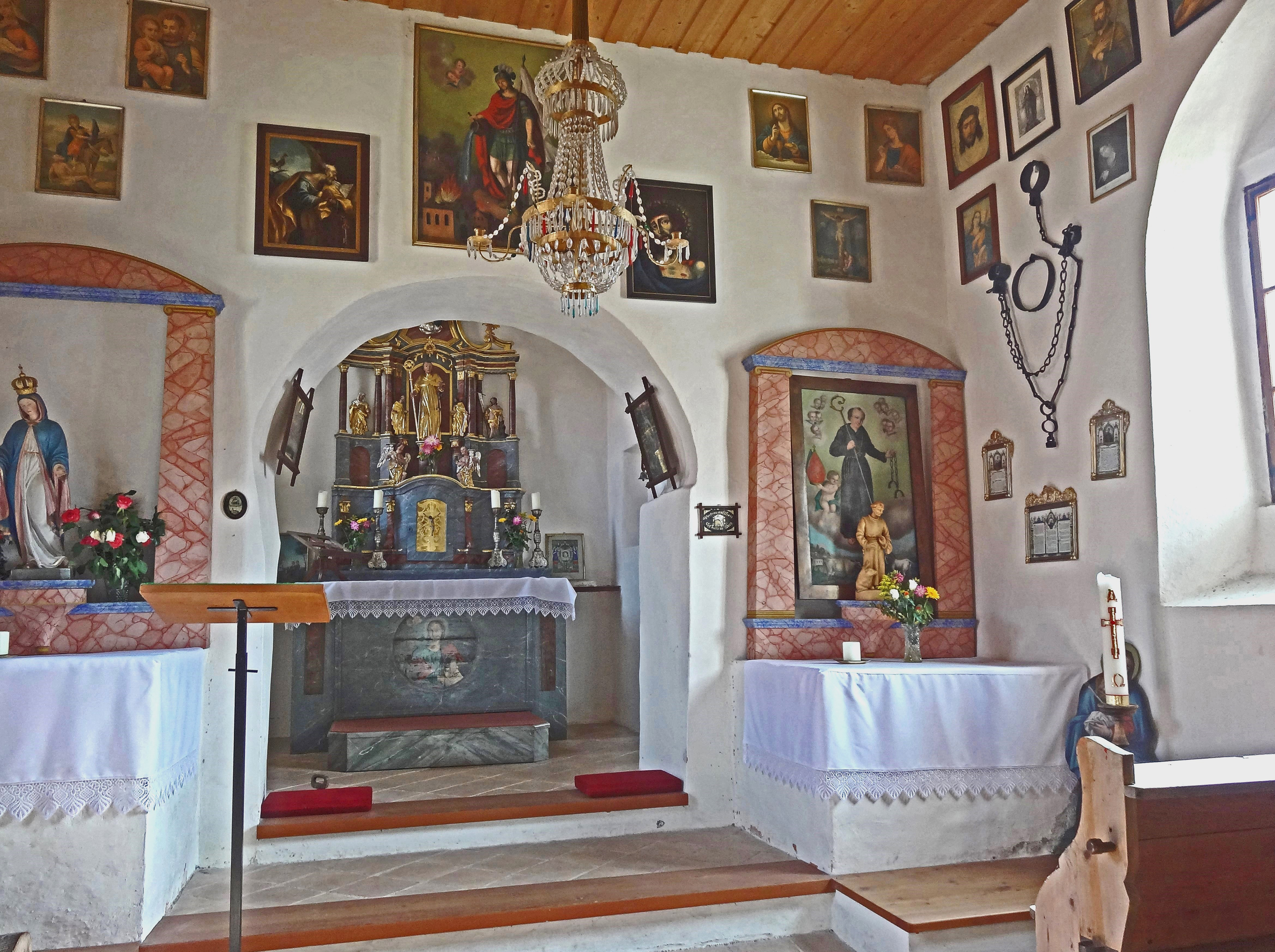 Kath. Filialkirche hl. Leonhard, Stocklitz (Feldkirchen in Kärnten). Innenansicht